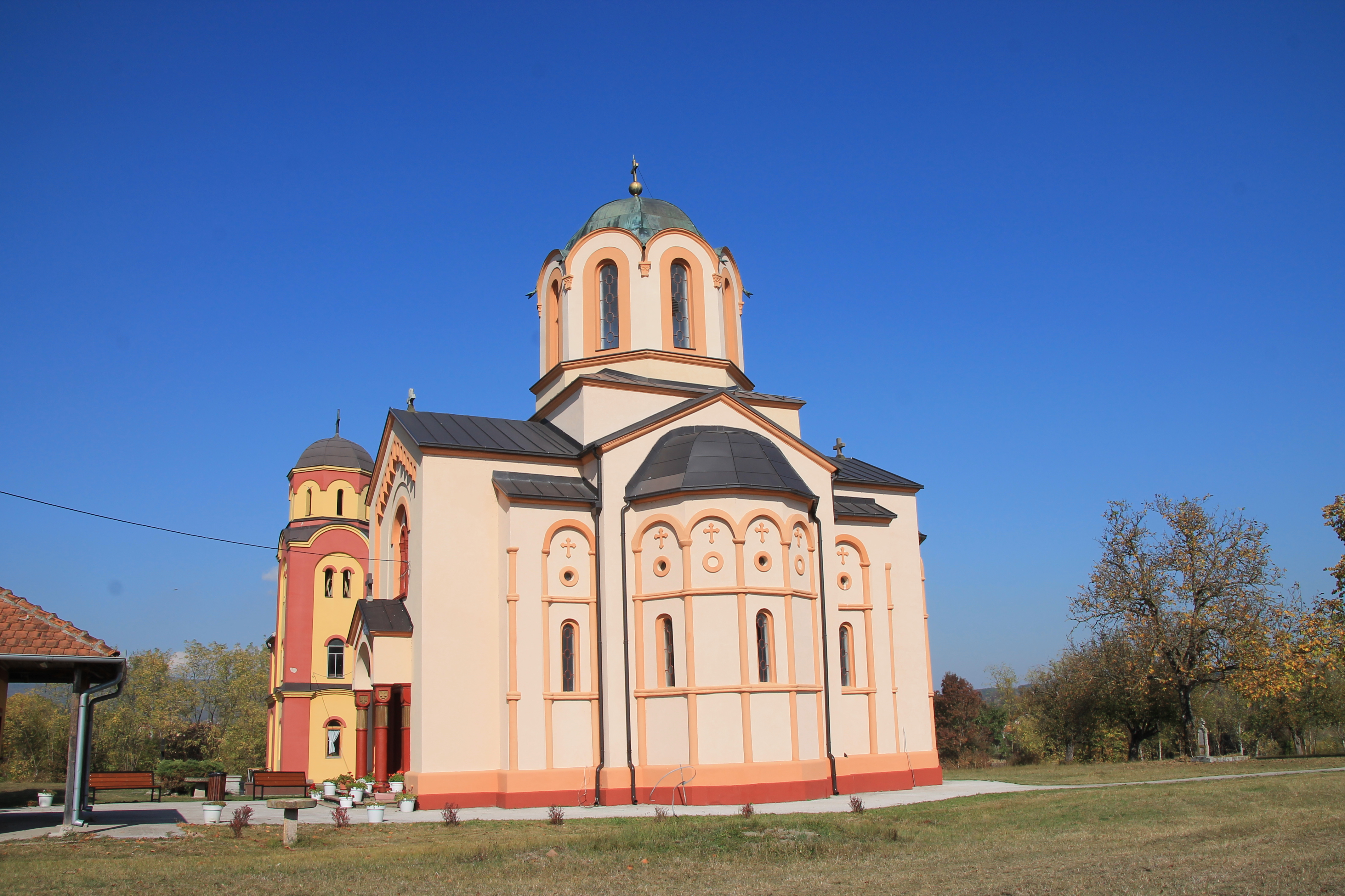 Crkva Sv. Marka (Bresnica)